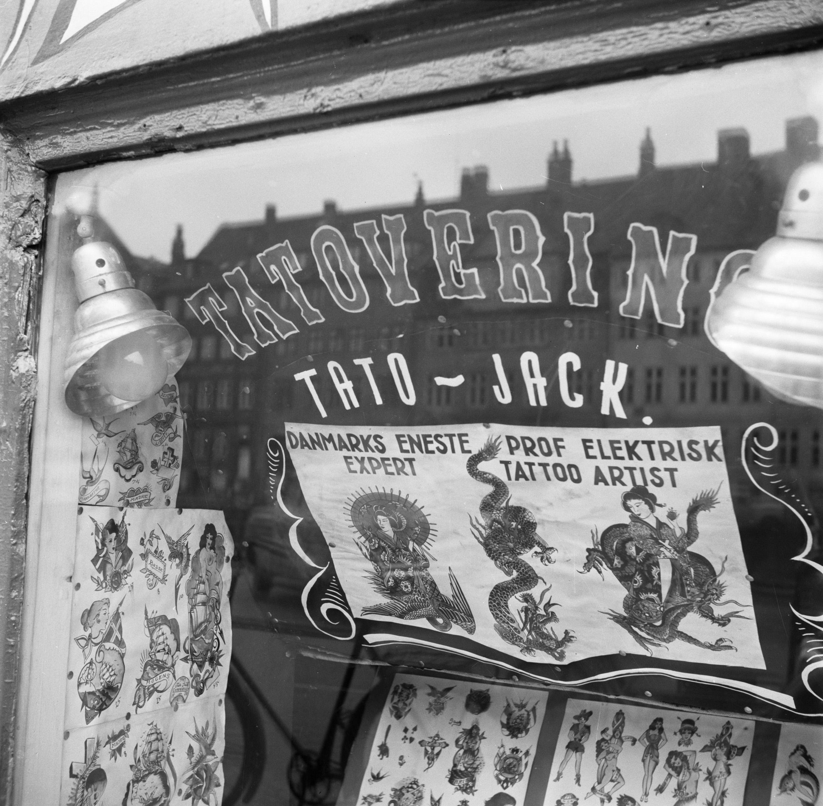 Collectie / Archief : Fotocollectie Van de Poll Reportage / Serie : Bezoek aan een tatoeage winkel in Kopenhagen Beschrijving : Afbeeldingen van tatoeages in de etalage van de winkel van tato Jack Datum : maart 1954 Locatie : Denemarken, Kopenhagen, Nyhavn Trefwoorden : etalages, gebouwen, tatoeages, tekeningen, winkels Fotograaf : Poll, Willem van de, [onbekend] Auteursrechthebbende : Nationaal Archief Materiaalsoort : Negatief (zwart/wit) Nummer archiefinventaris : bekijk toegang 2.24.14.02 Bestanddeelnummer : 252-9233